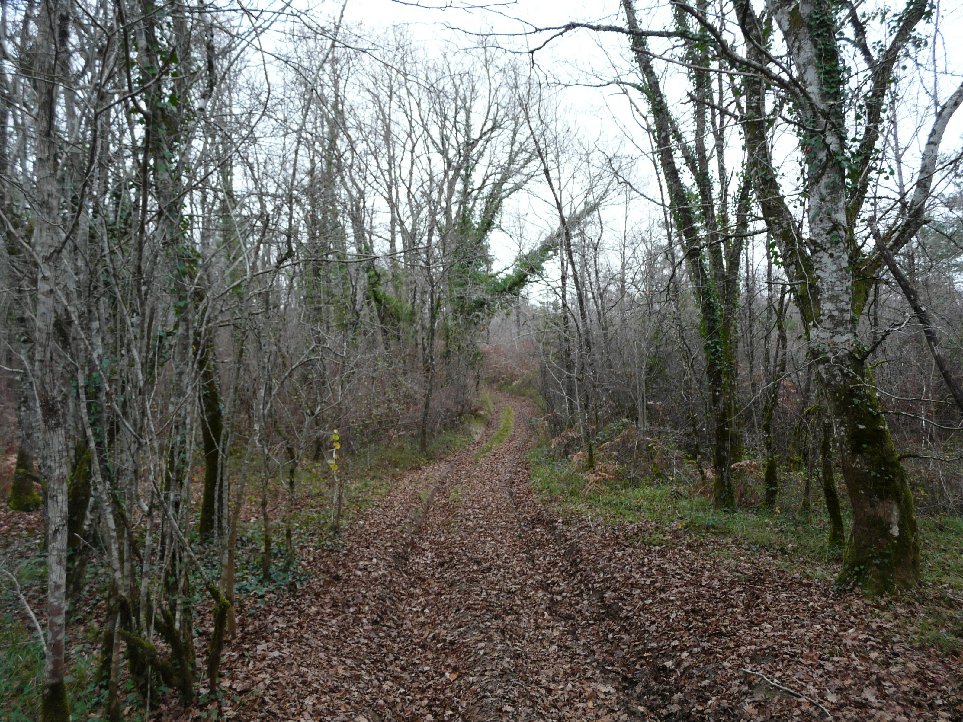 Le causse de Cubjac près de la Fosse Pérel, Cubjac, Dordogne, France.